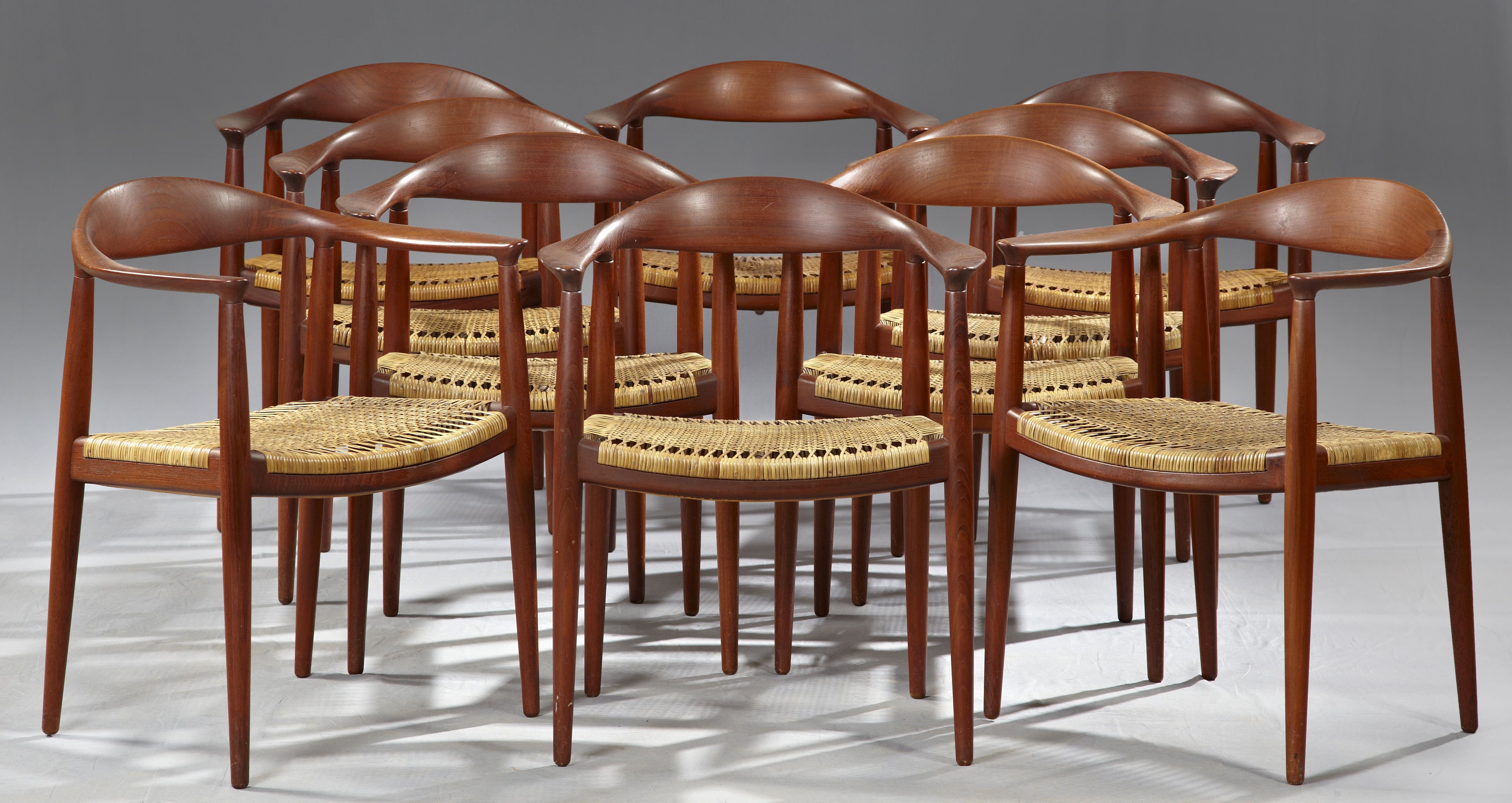 circa 1960